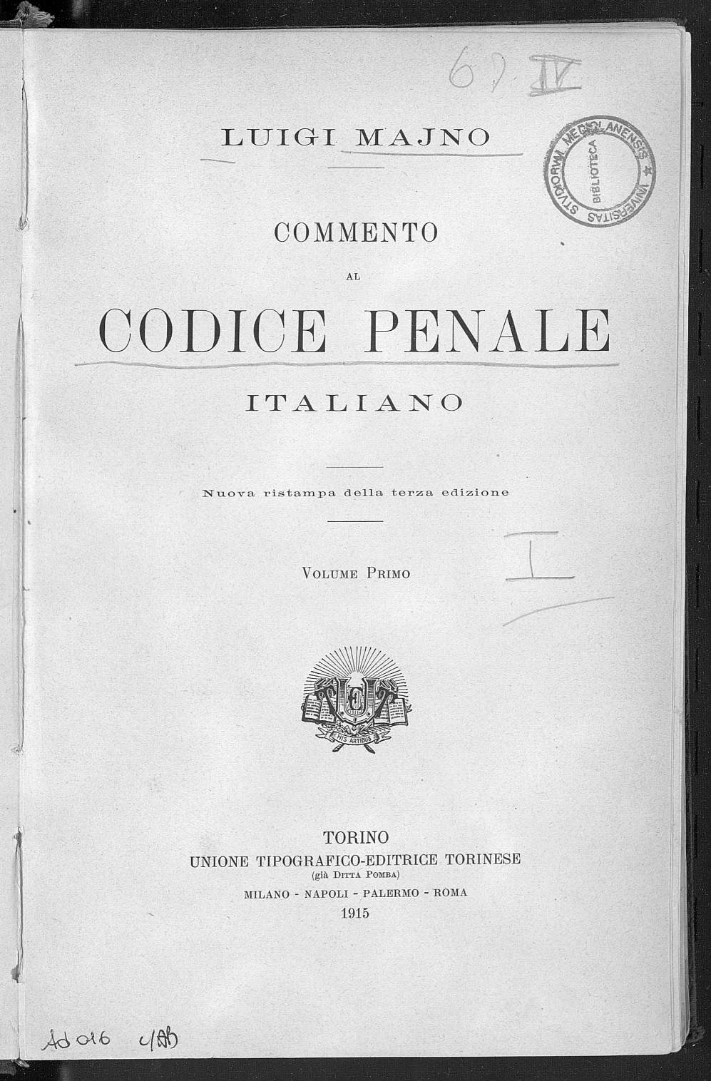 Frontespizio